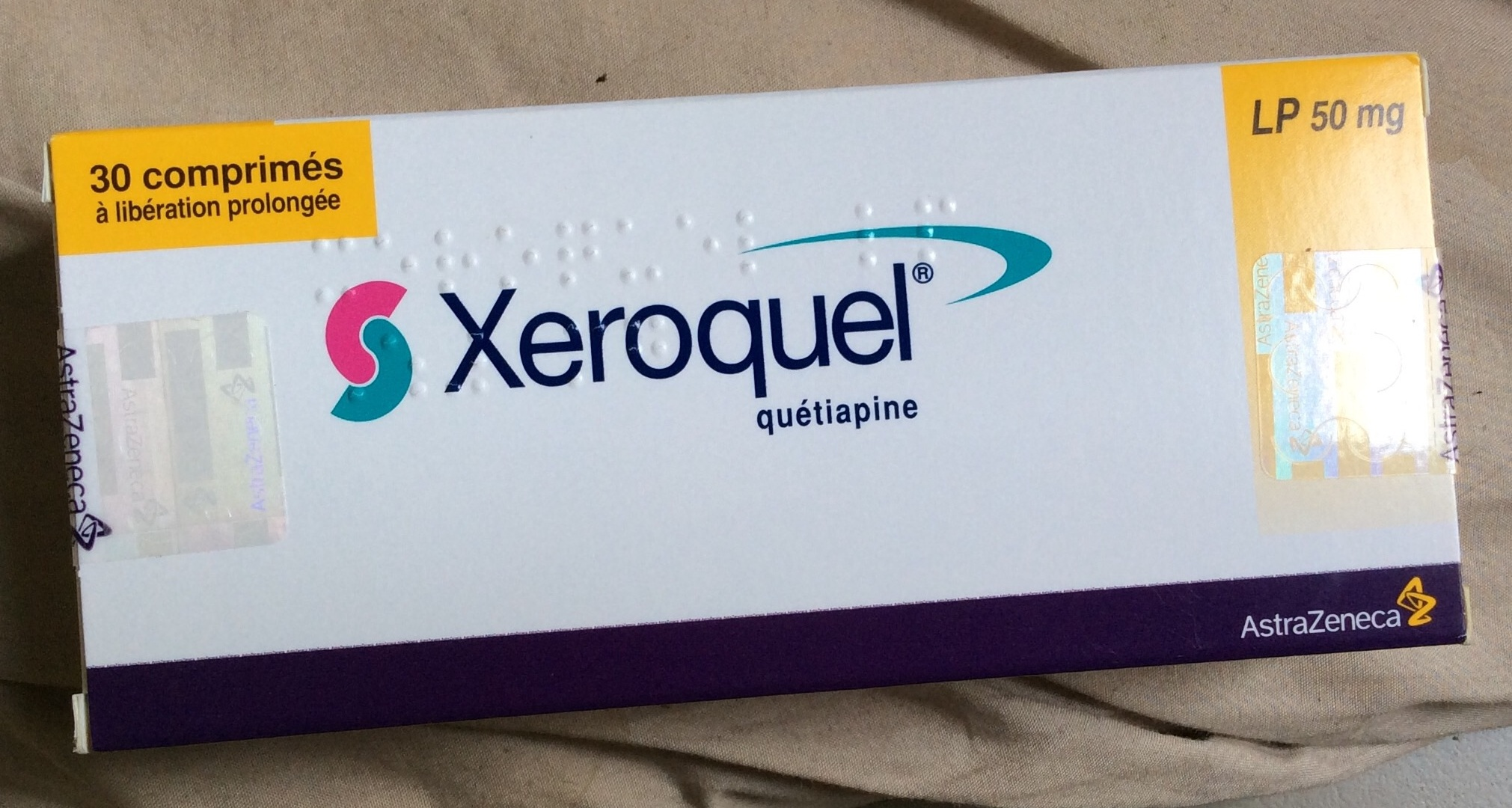 Boite de Xeroquel 50 LP